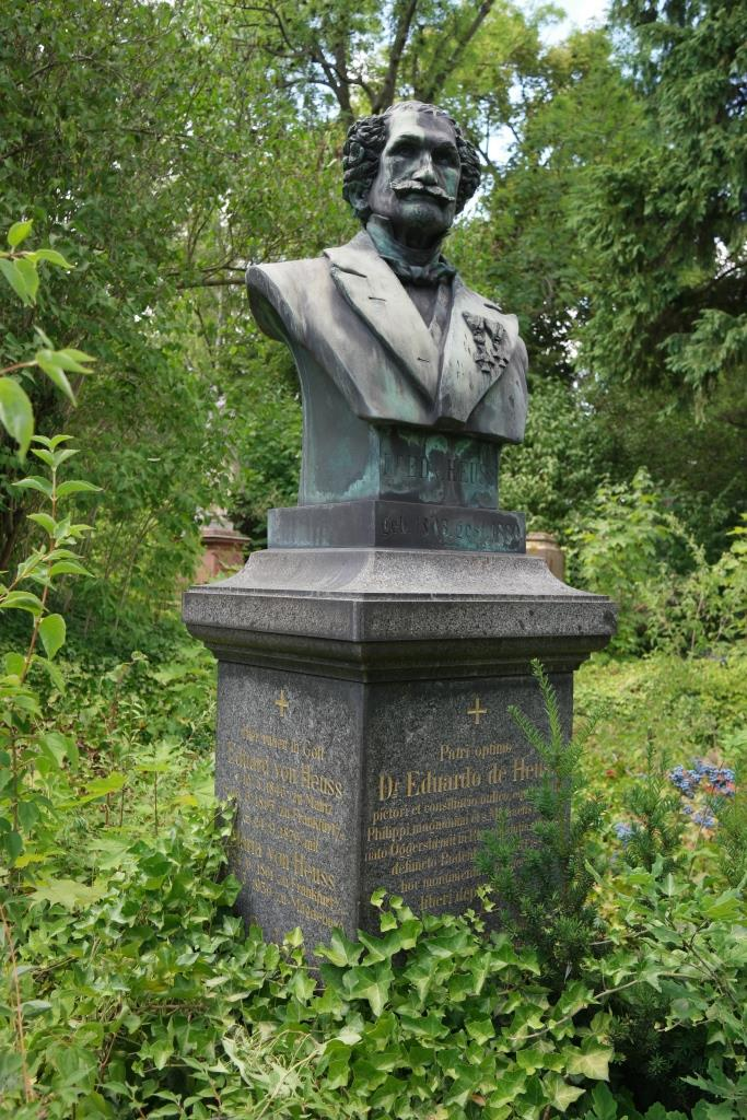 Grab des Mediziners und Malers Eduard von Heuss (1808-1880) auf dem Hauptfriedhof Mainz